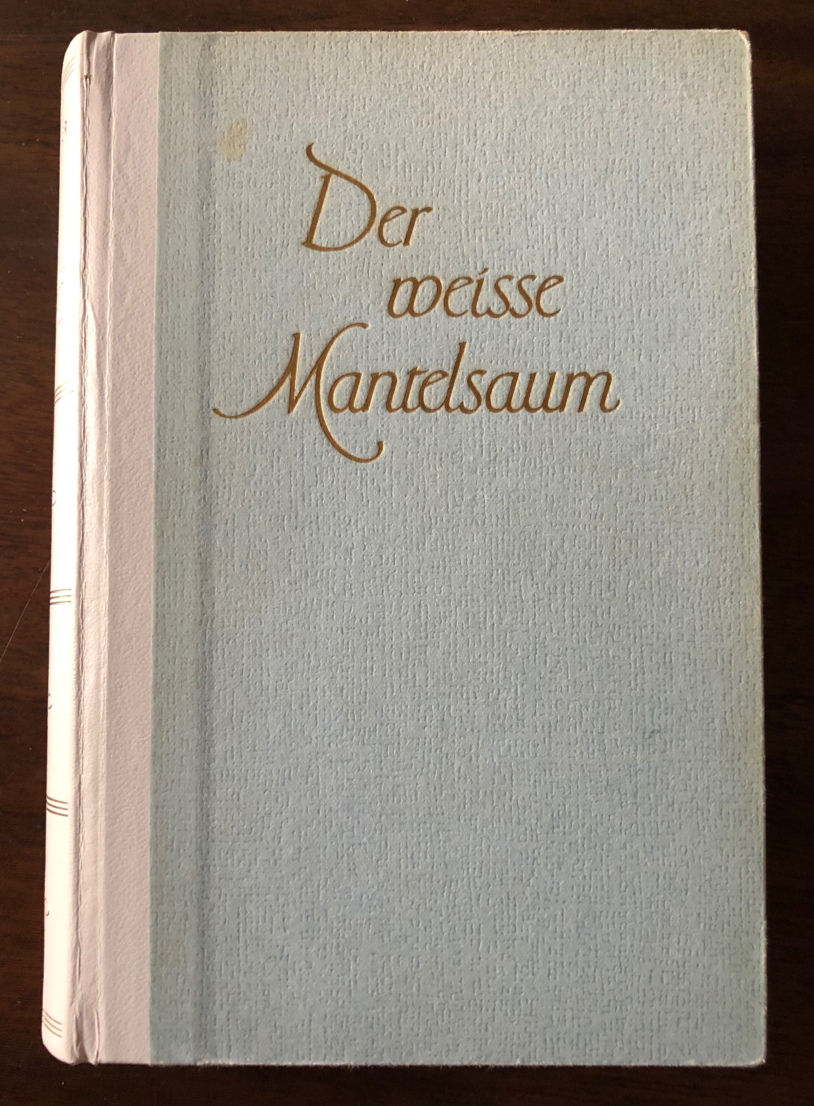 Buchtitel von Walter Alvares Keller